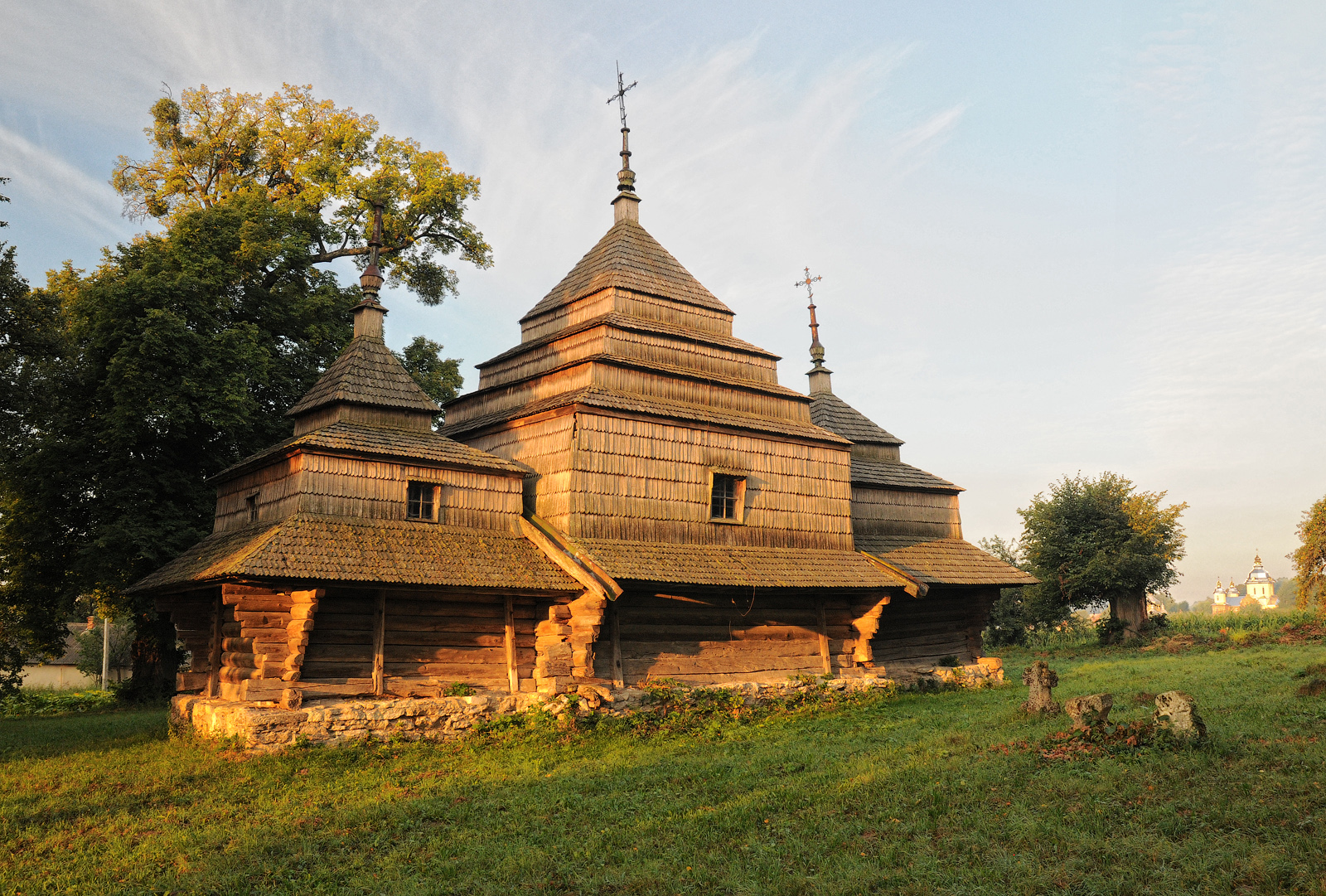 Церква Св. Василія Великого в Черче